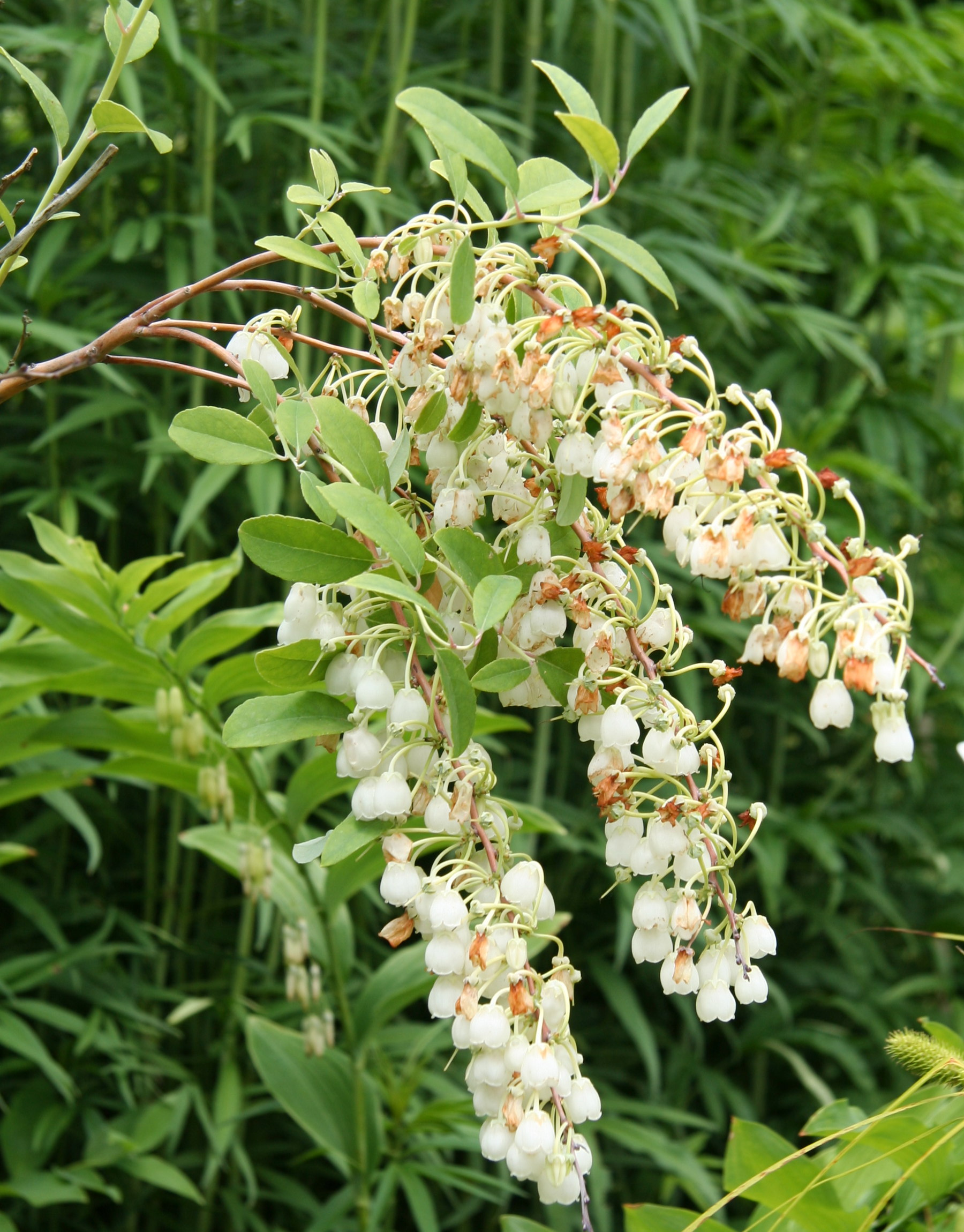 Zenobia pulverulenta im Botanischen Garten Dresden